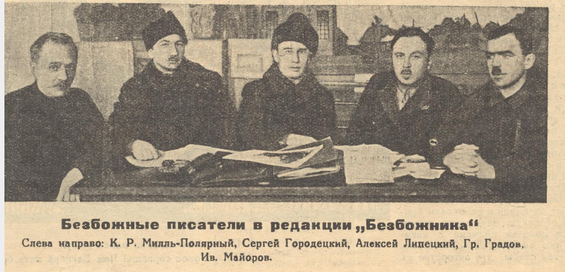 Безбожные писатели в редакции „Безбожника“ Слева направо: К. Р. Милль-Полярный, Сергей Городецкий, Алексей Липецкий, Гр. Градов, Ив. Майоров.